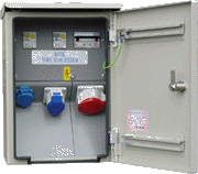 Tankstelle Park&Charge Standard